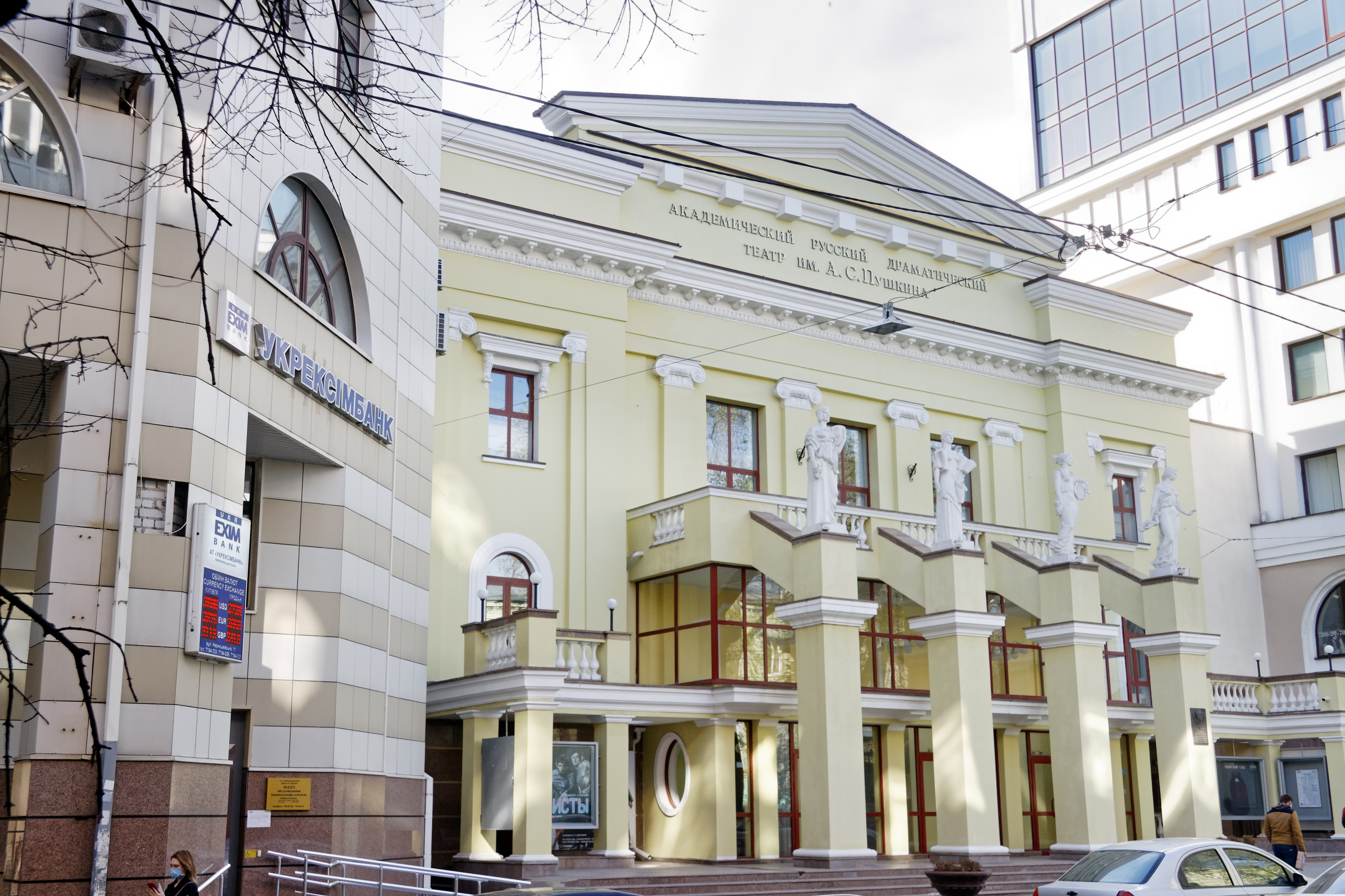 Будівля Харківського державного академічного російського драматичного театра імені О. С. Пушкіна (фасад) після завершення її відбудови. Розташована по вул. Чернишевській, 11, у Харкові. Будівля клубу друкарів (побудована у 1927 р.), в якій працював театр, наприкінці 1970-х була значною мірою зруйнована пожежею. Відкрита після відновлення у 2003.